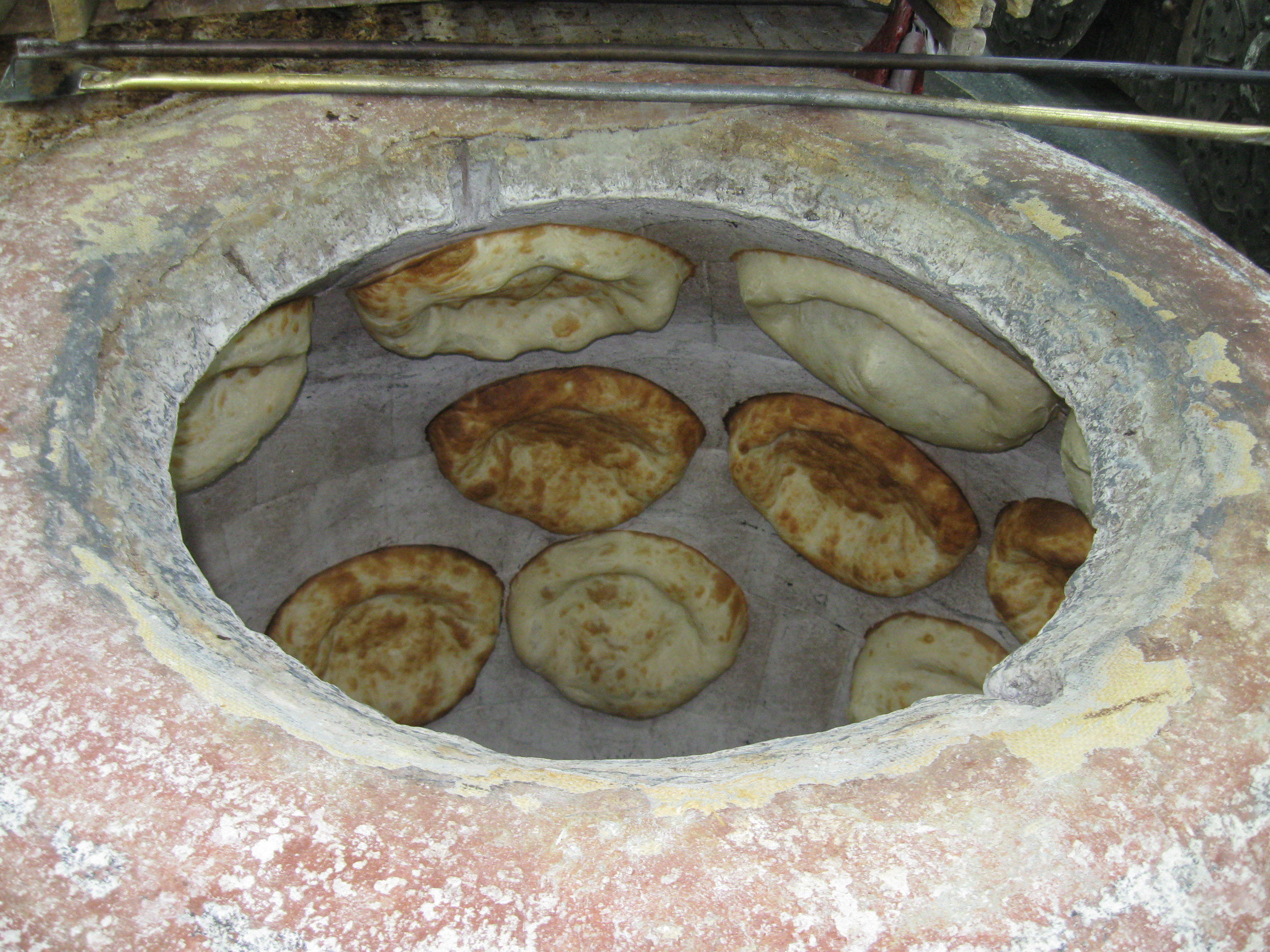 Գնթունիք հացամթերքի խանութում